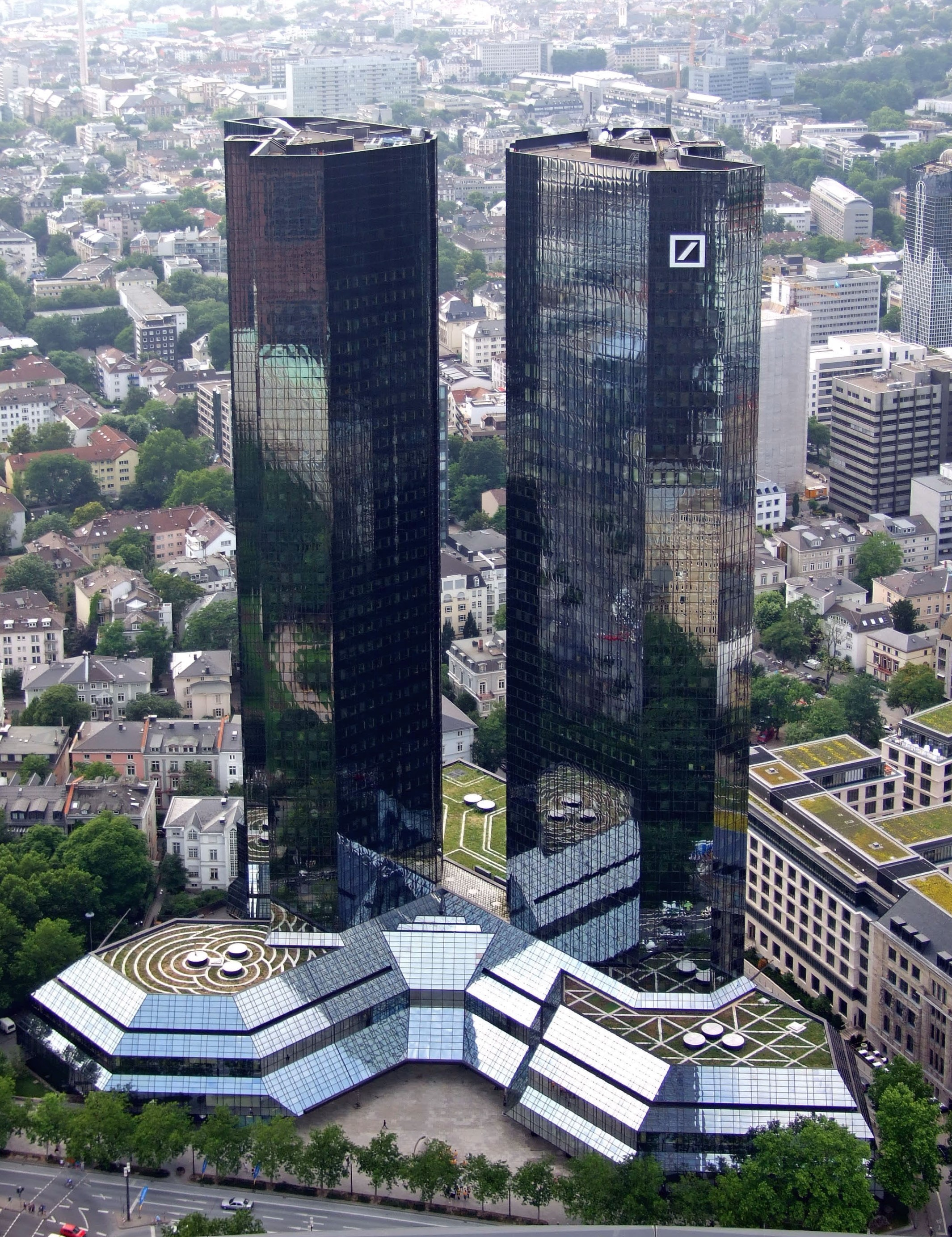 Deutsche Bank, Zentrale und Verwaltung